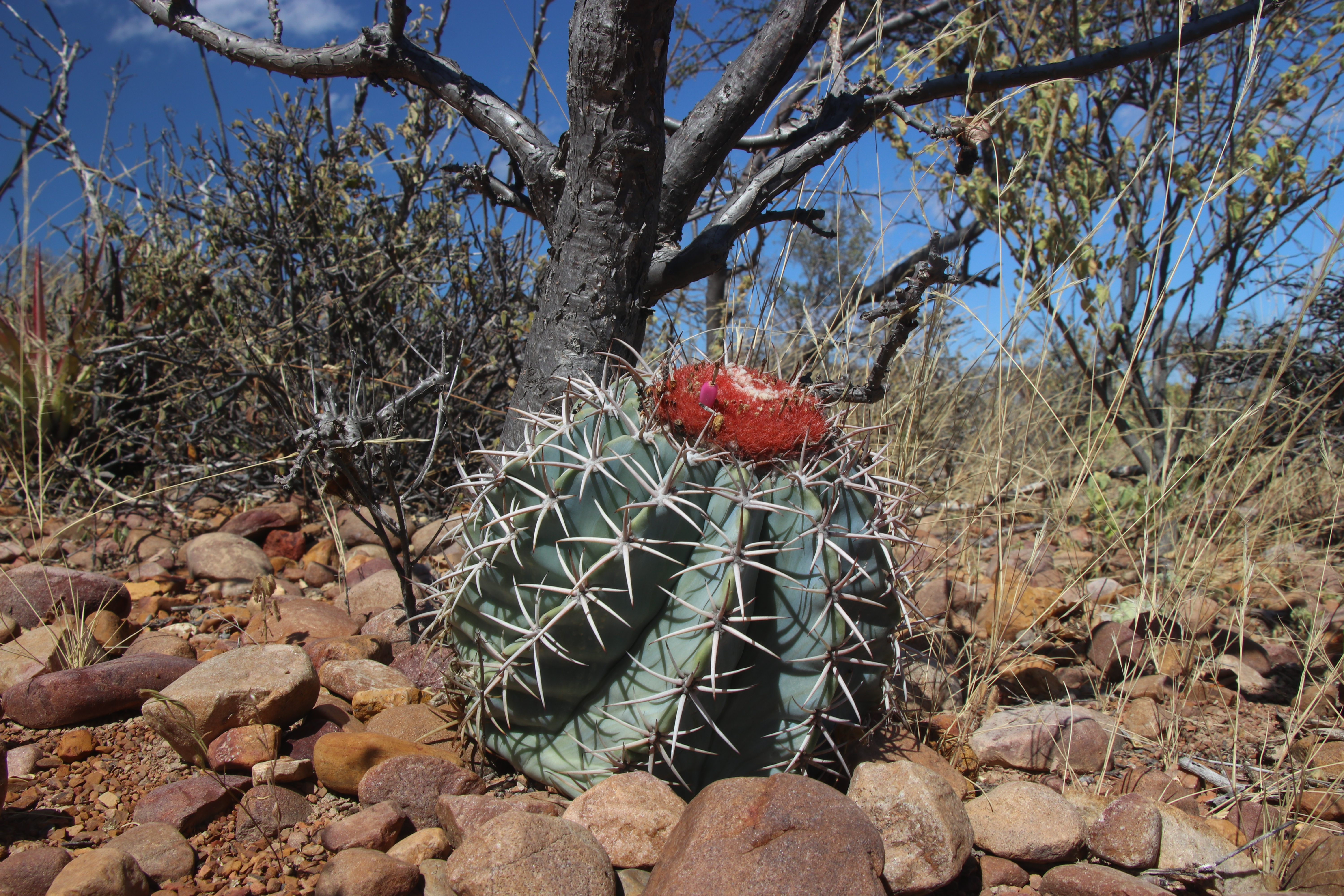 Melocactus zehntneri ssp. douradaensis in Bahia 2019